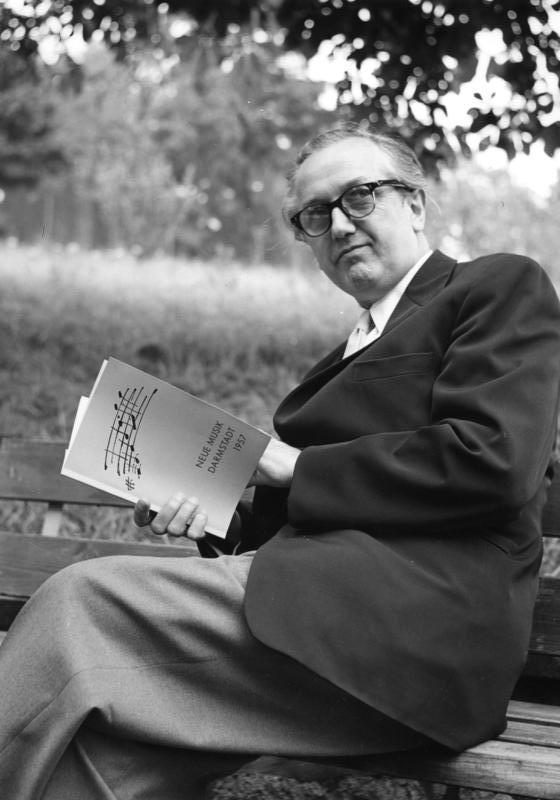 Juli 1957 12. Internationale Ferienkurse für neue Musik, Darmstadt GMD (Generalmusikdirektor) Professor Heinz Dressel, Essen geb. 23. Juni 1902 in Mainz, studierte in Köln bei Hermann Abendroth, wurde Kapellenmeister in Plauen, in Lübeck (1934 GMD), seit 1942 dgl. in Münster.